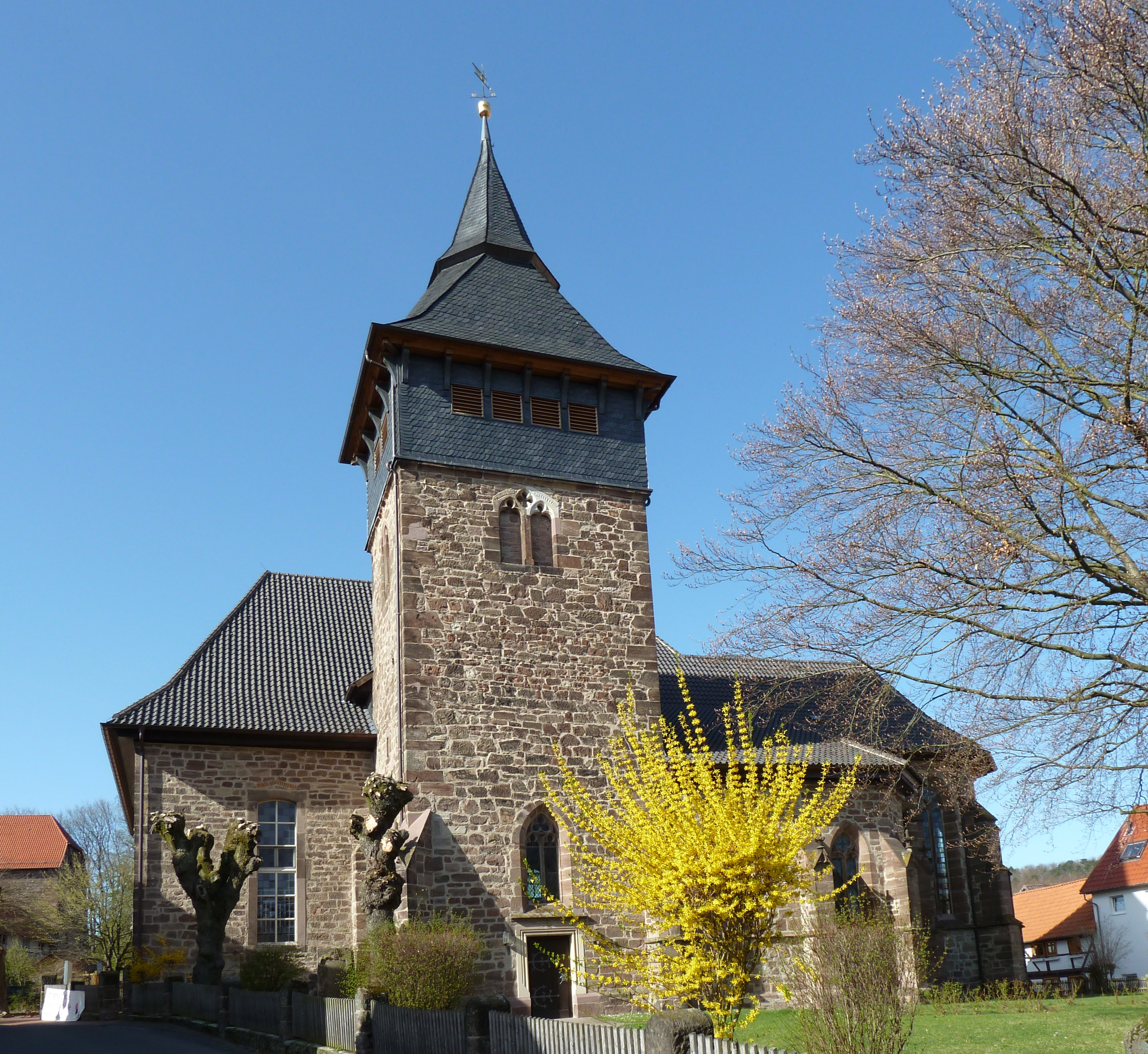 Ev.-luth. Kirche St. Mauritius in Hardegsen, Niedersachsen, Westansicht. Spätgotische Kirche, Schiff größtenteils 1765/89 neu errichtet